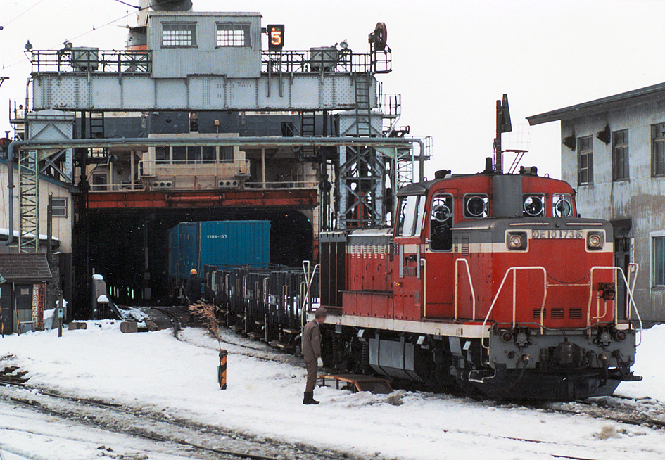 DE10 1736の航送車入換 （十和田丸）